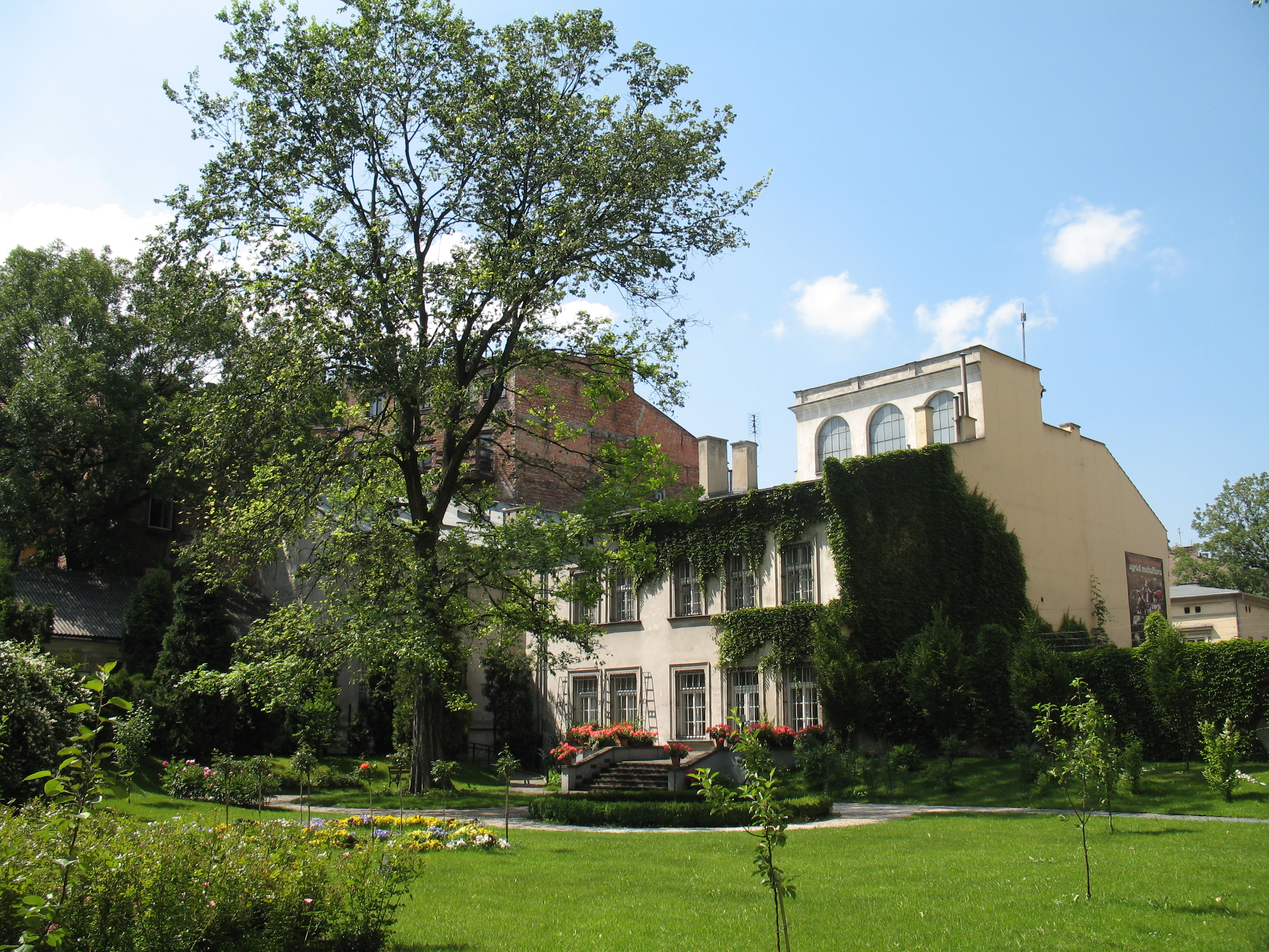 Ogród Józefa Mehoffera, ul. Krupnicza 26, Kraków Józef Mehoffer's garden, 26 Krupnicza Street, Kraków